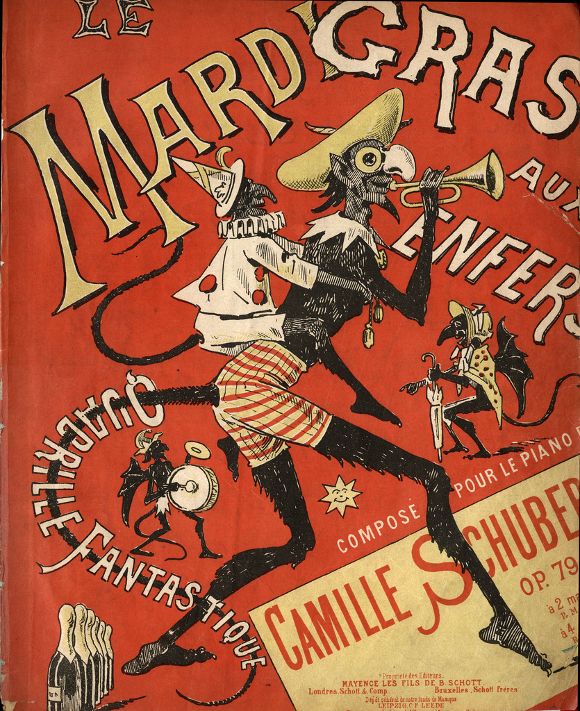 Couverture de la partition pour piano de Le Mardi gras aux enfers, quadrille fantastique de Camille Schubert.